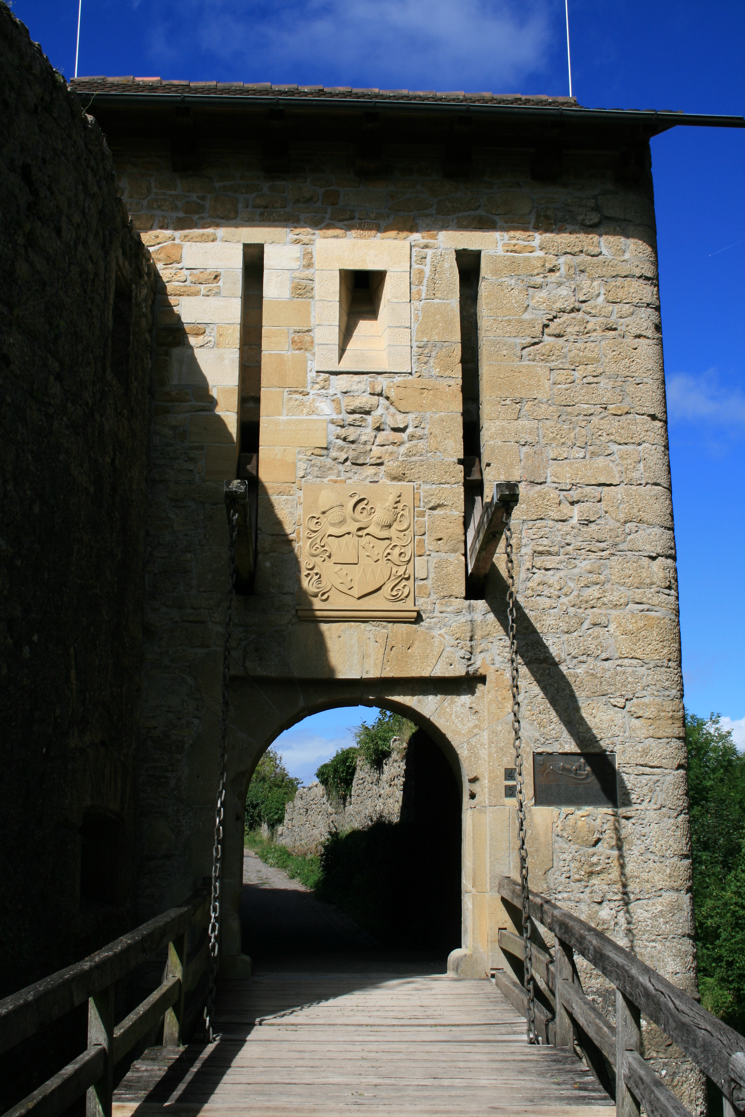 Küssaburg, Küssaberg, Baden, Deutschland